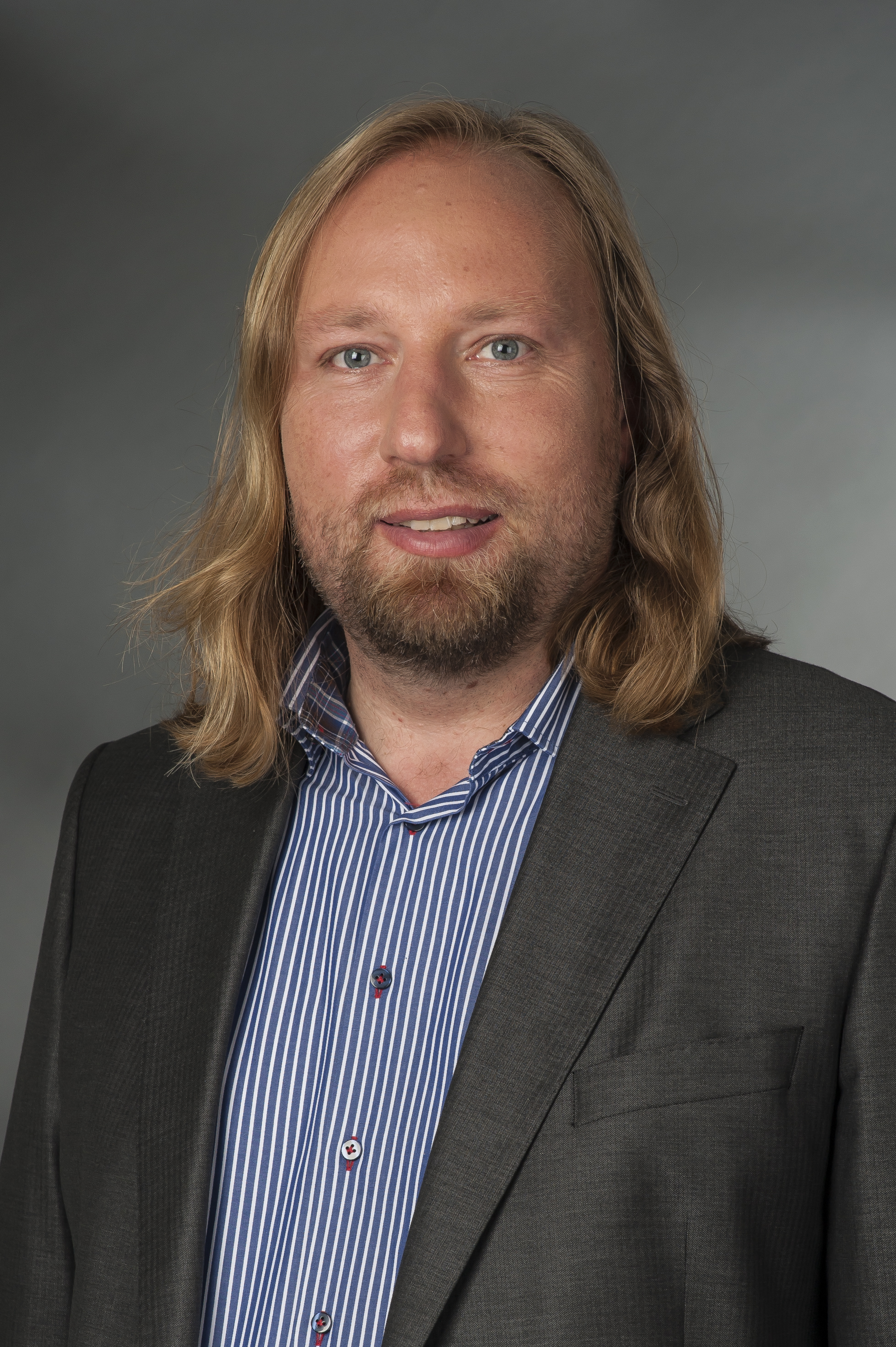 Anton Hofreiter (* 2. Februar 1970 in München) ist ein deutscher Politiker (Bündnis 90/Die Grünen) und Biologe. Er ist seit 2005 Mitglied des Deutschen Bundestages und dort seit 2011 Vorsitzender des Ausschusses für Verkehr, Bau und Stadtentwicklung. Seit Oktober 2013 ist er neben Katrin Göring-Eckardt Vorsitzender der grünen Bundestagsfraktion.